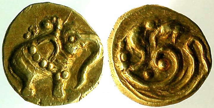 Indische Fanam-Münze aus dem 11./12. Jahrhundert, Motiv: Elefant